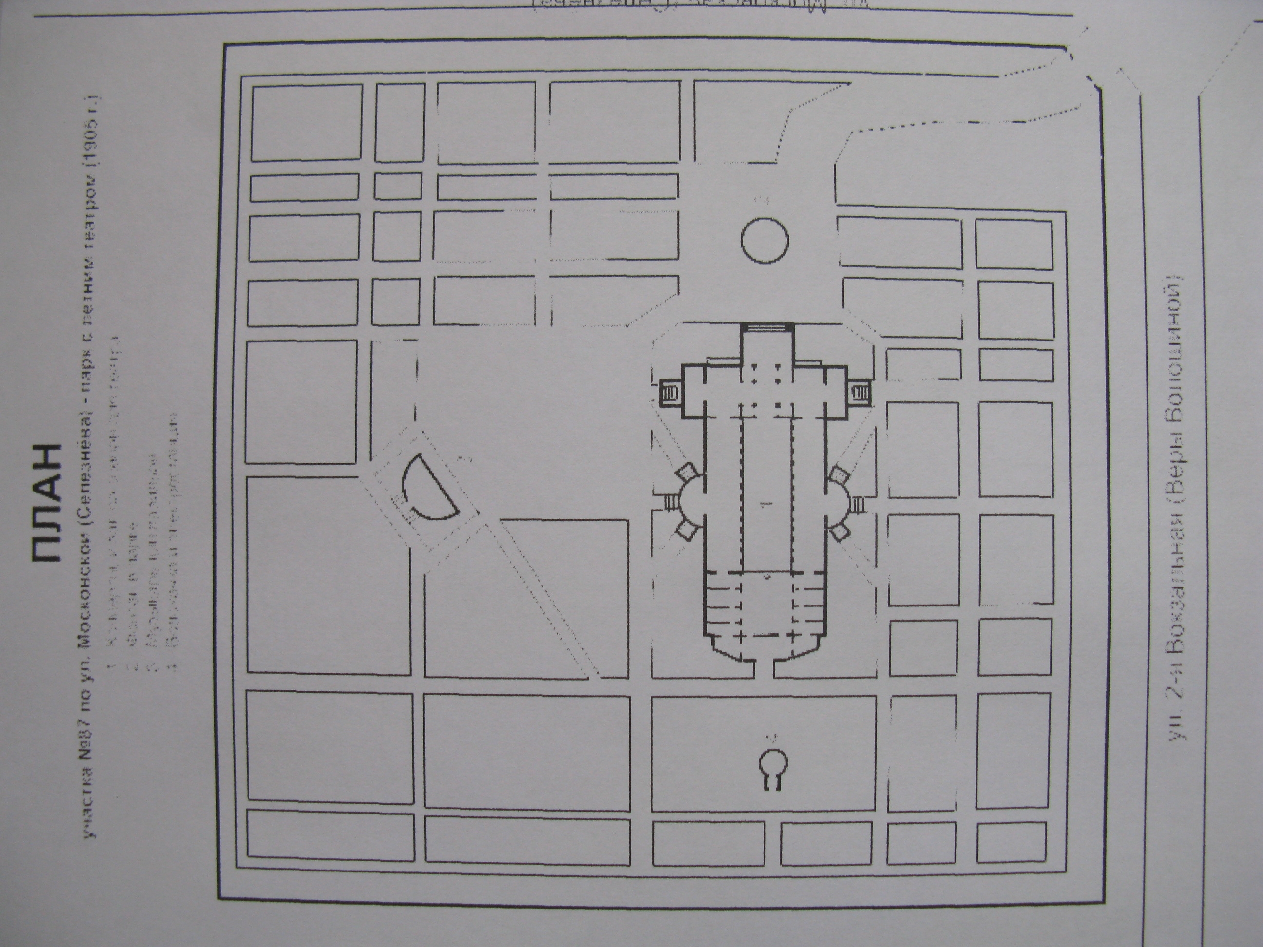 План летнего театра в Перловке